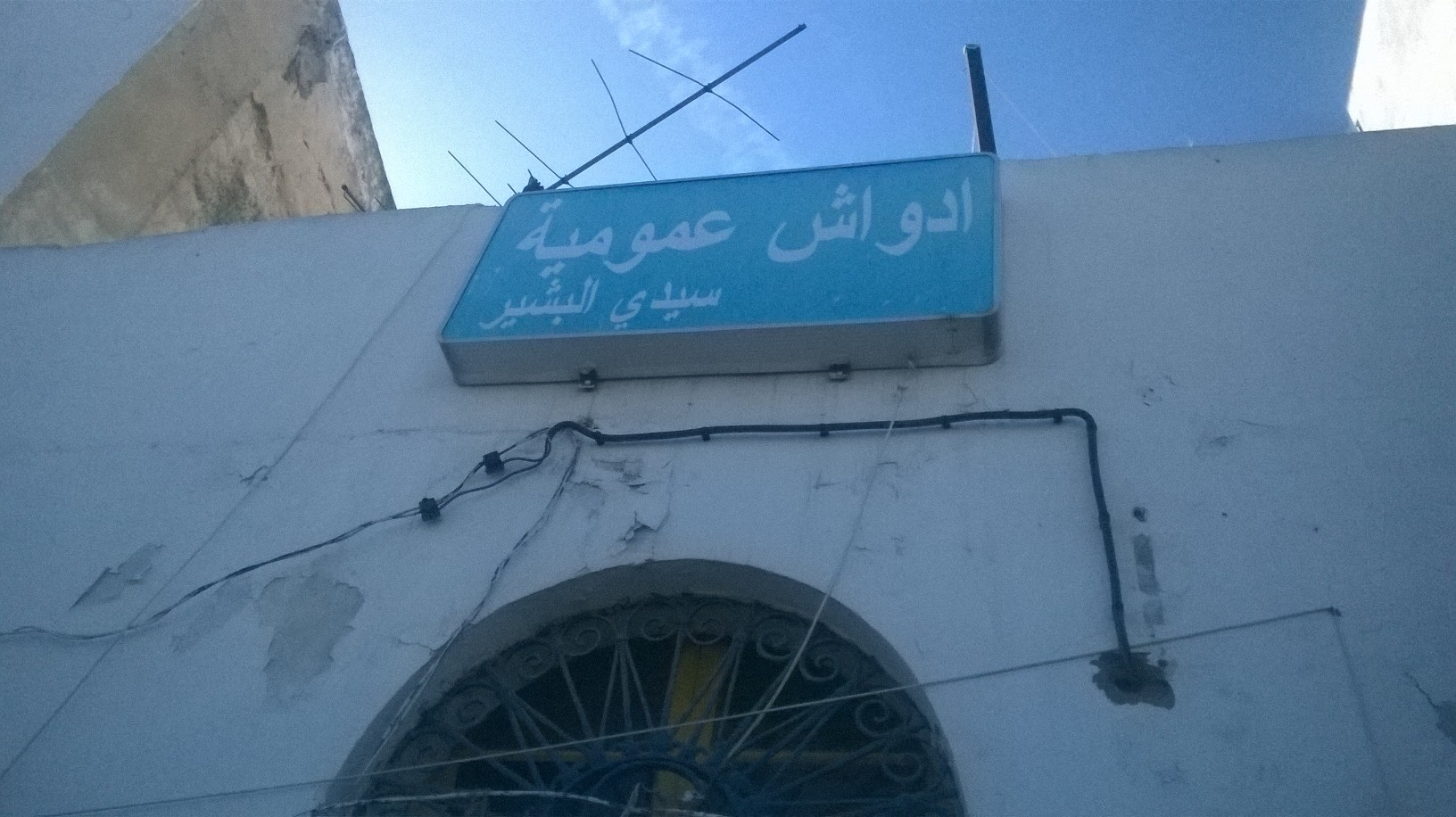 Sidi El Béchir, Tunis سيدي البشير ، تونس